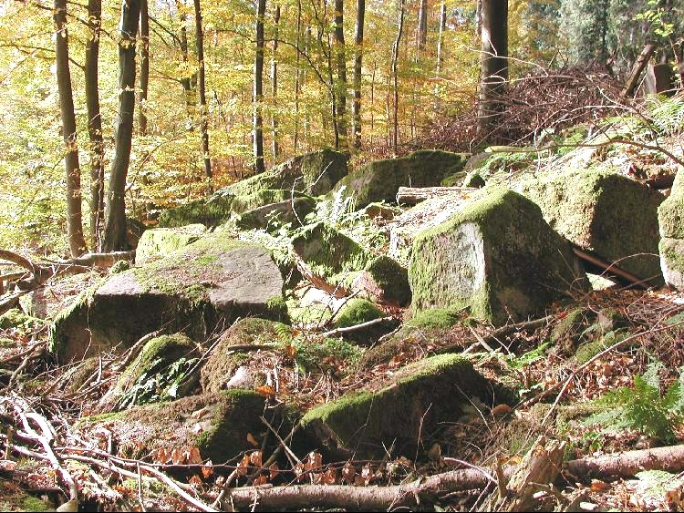 Buntsandsteinfelsenmeer bei Heidelberg)